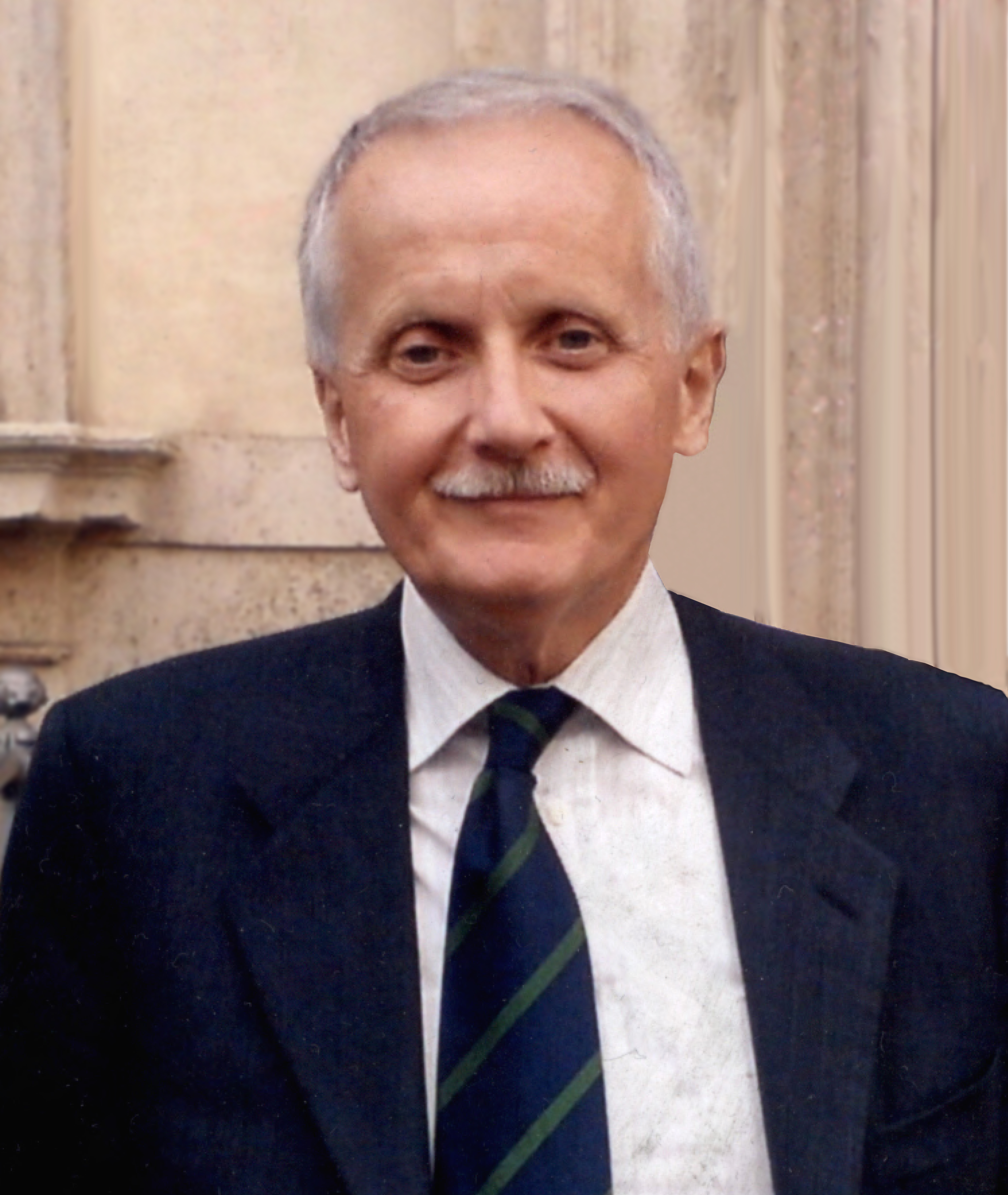 Marcello Mochi Onori (1946 -2017)